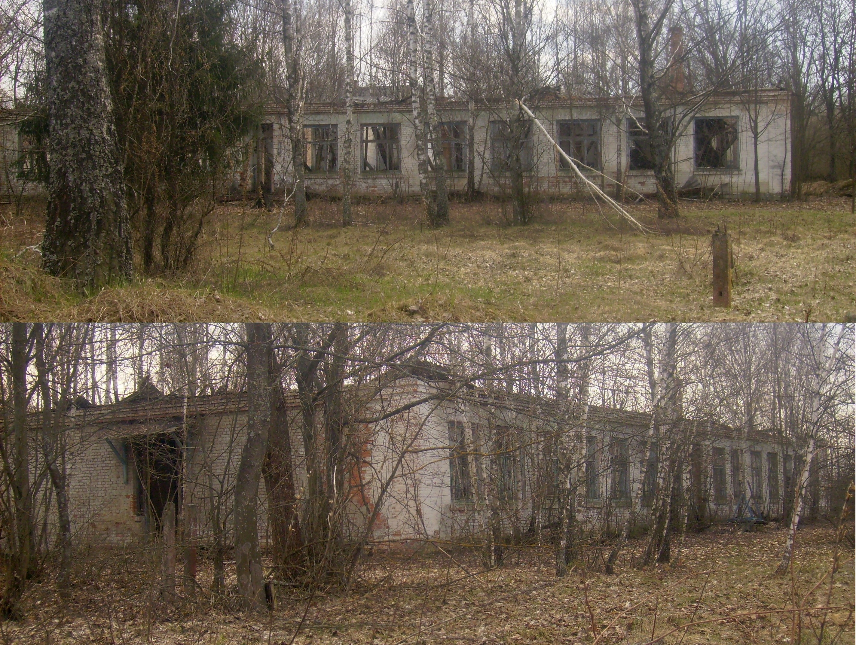 Приміщення старої школи у с. Тараси Поліського р-ну Київської області, Україна. Зона відчуження ЧАЕС.